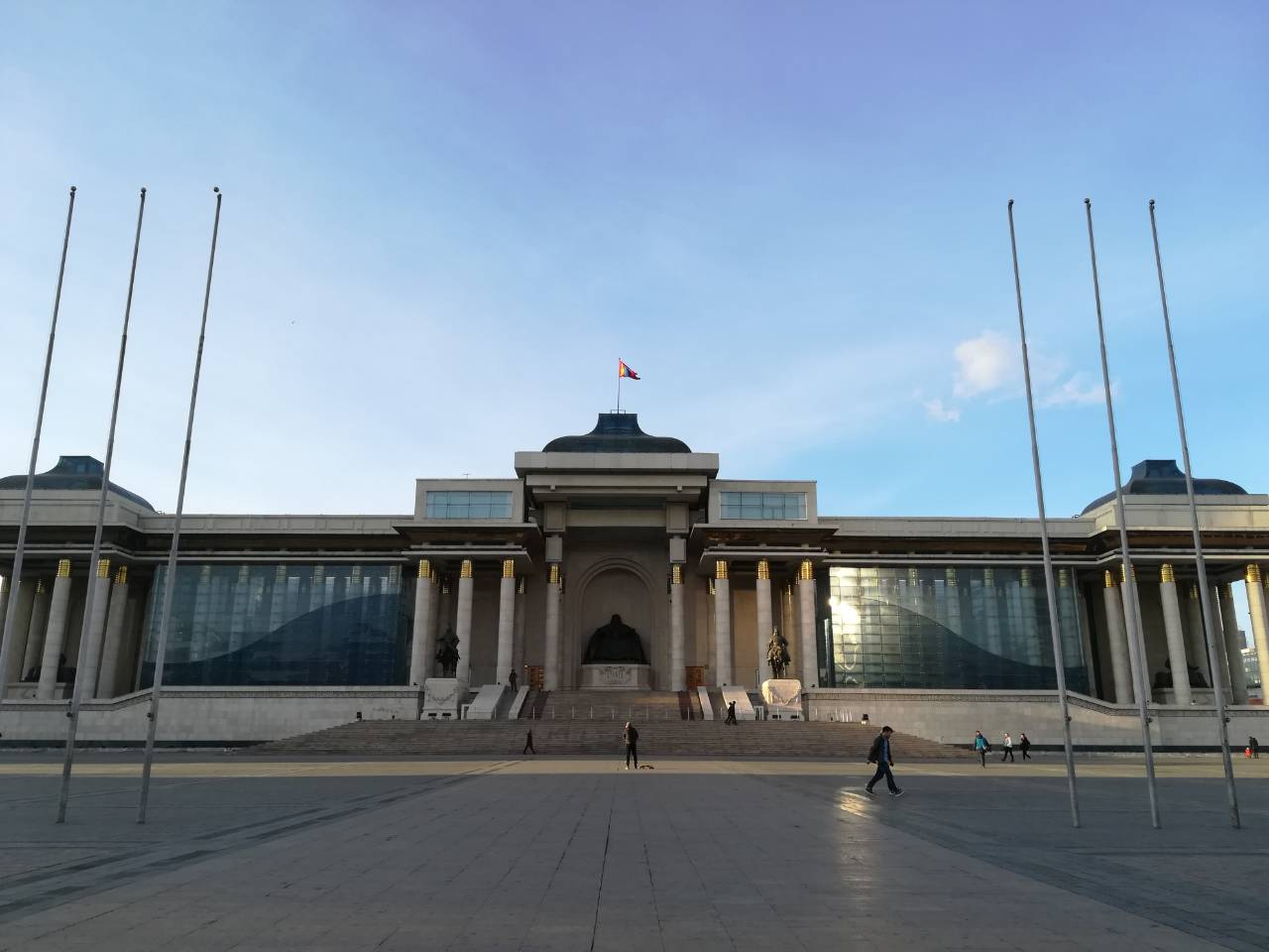 Facade of the Government Palace. Monument to Genghis Khan and his two nukers